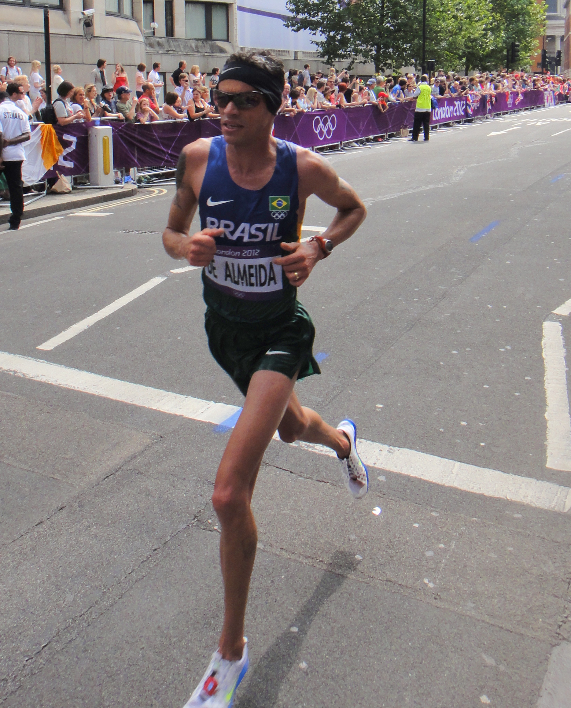 Franck de Almeida (Brazil) - London 2012 Men's Marathon